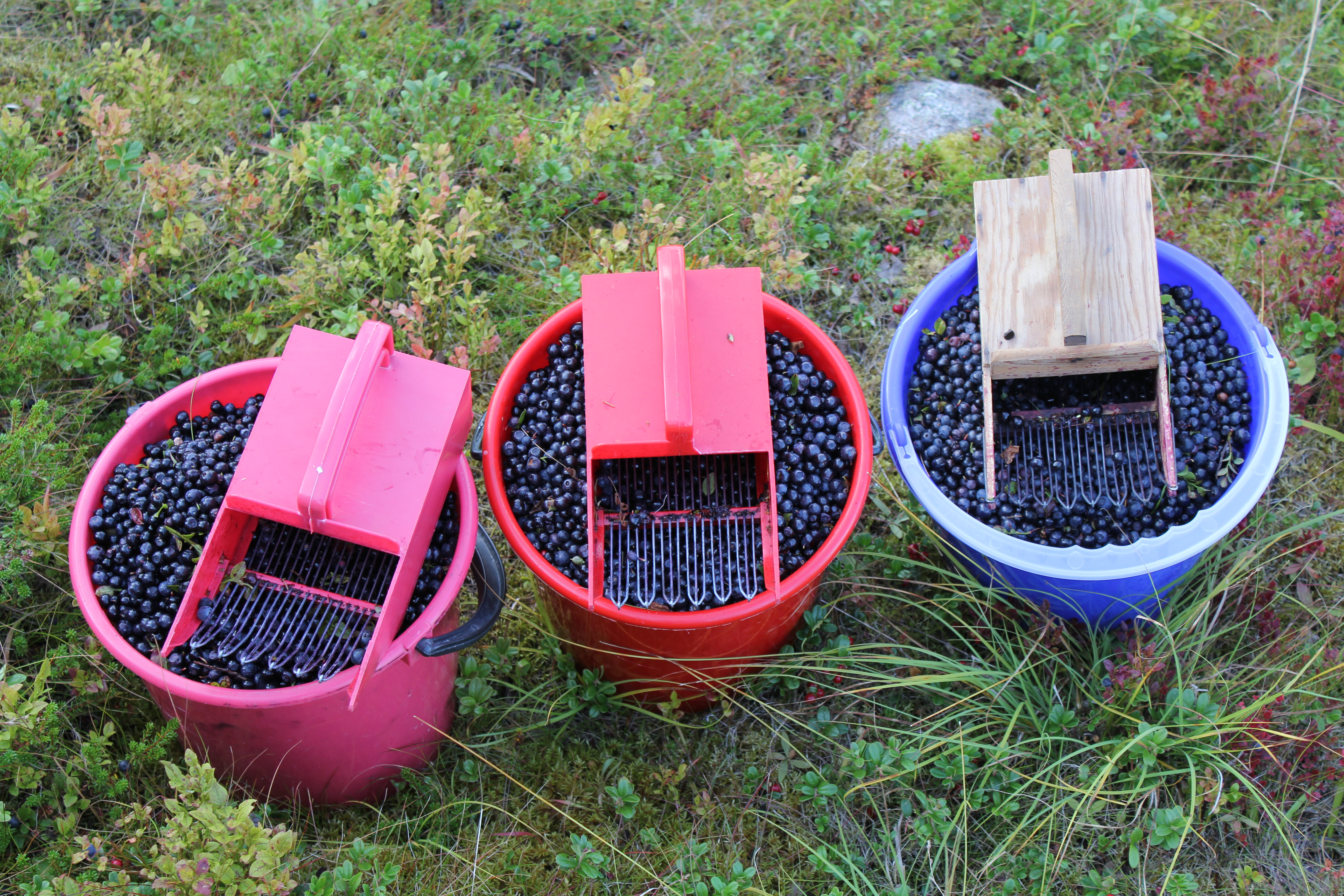 Tre bøtter blåbær.